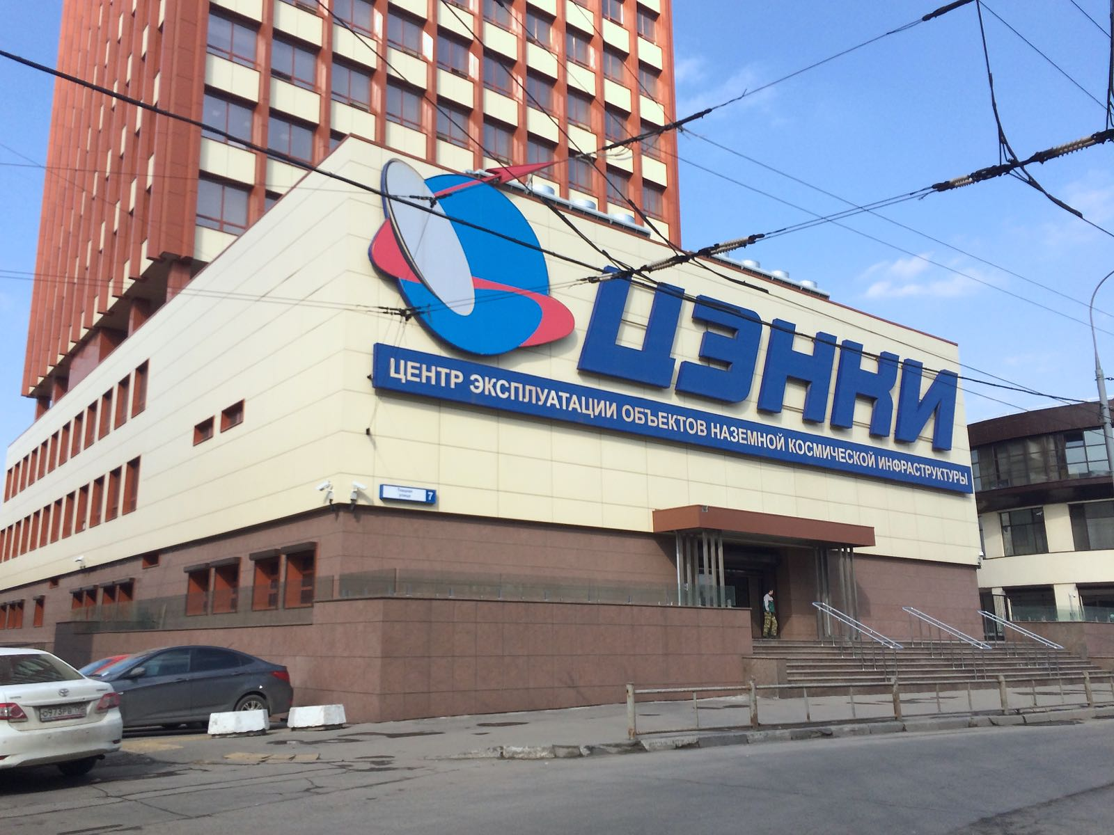 Здание ЦЭНКИ на Ткацкой улице в Москве